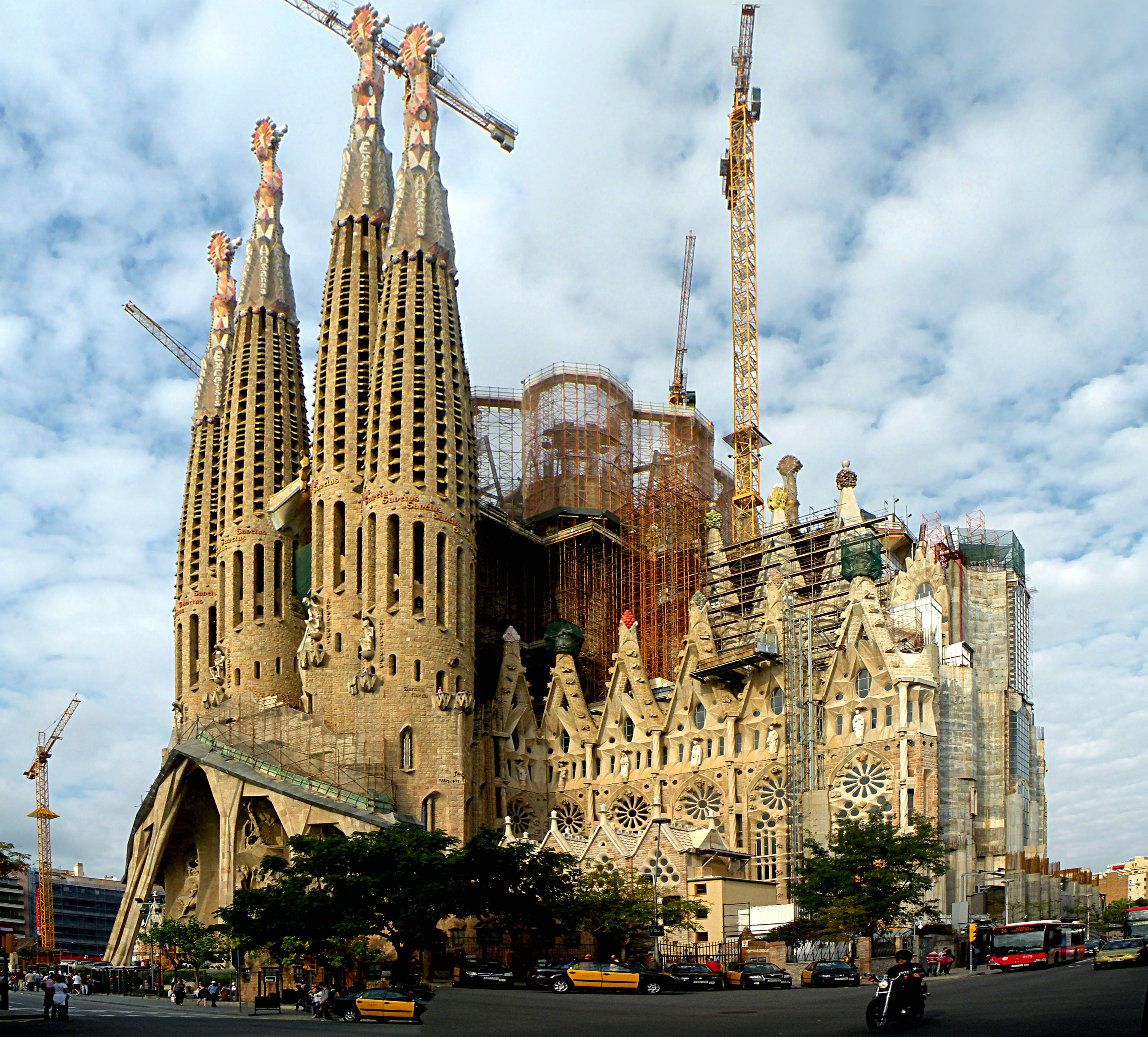 La Sagrada Familia by Antoni Gaudi (1852-1926)